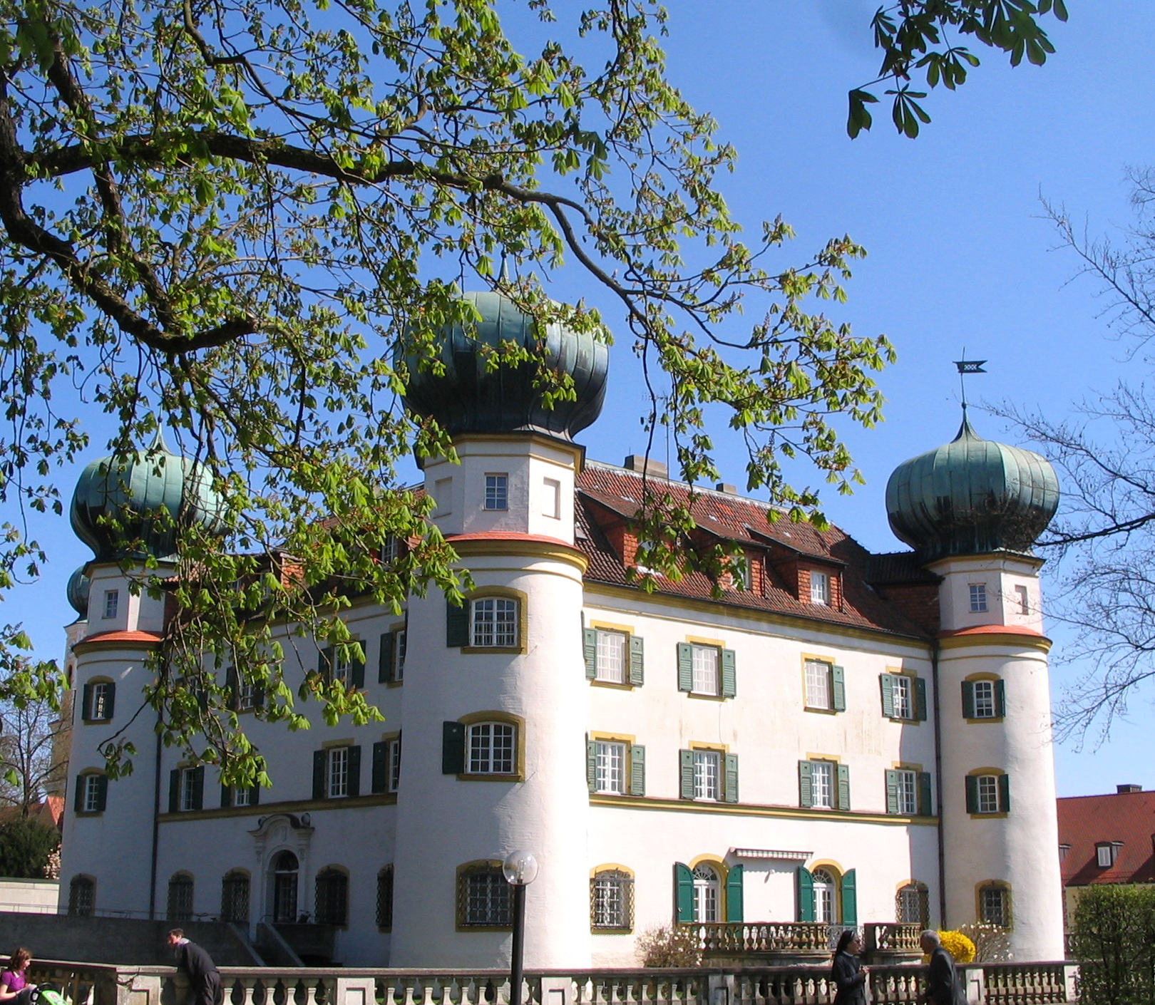 Schloss Offenstetten, Landkreis Kelheim, Niederbayern